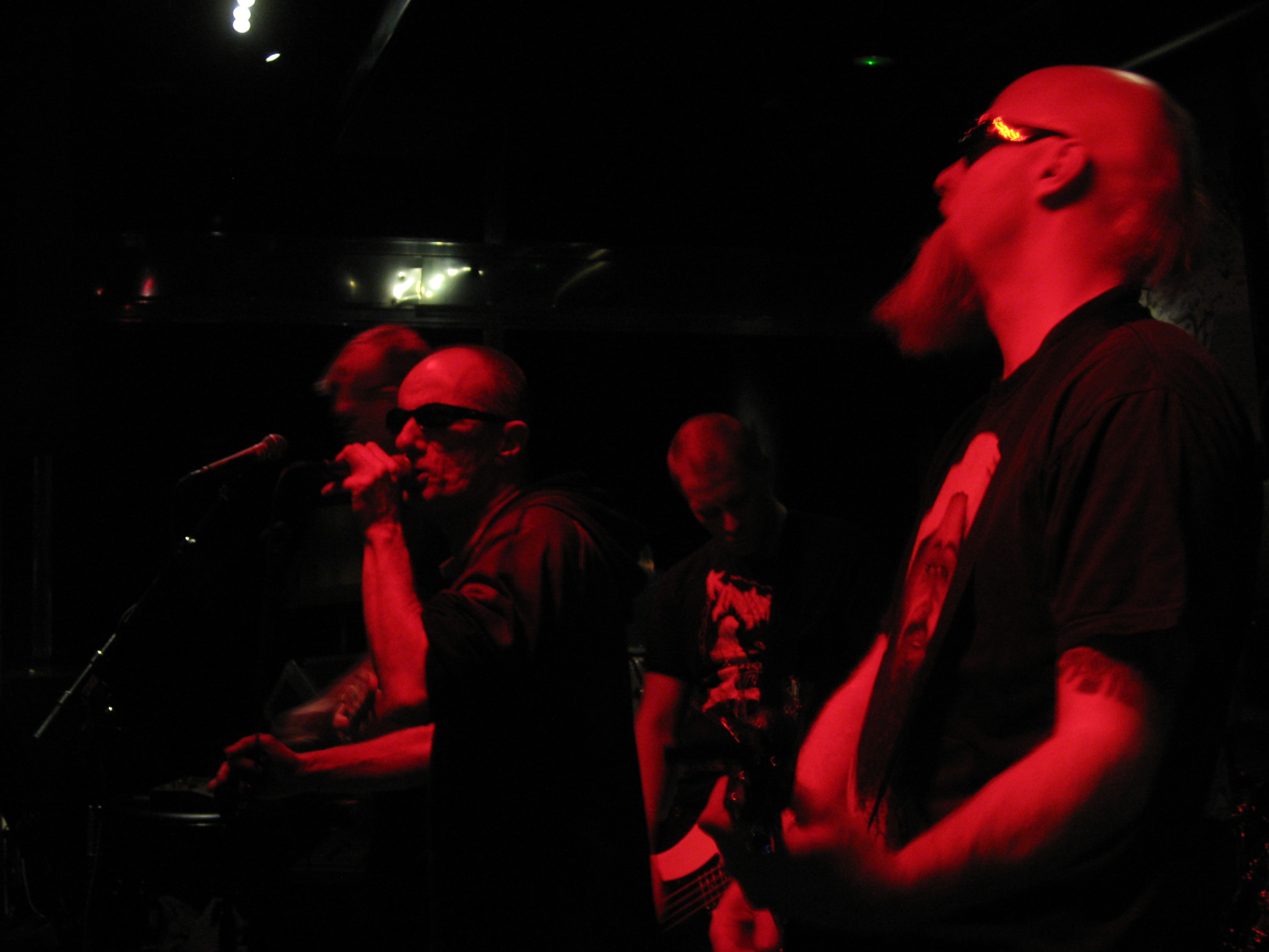 Rävjunk playing at Punkgala in Stockholm April 2010.